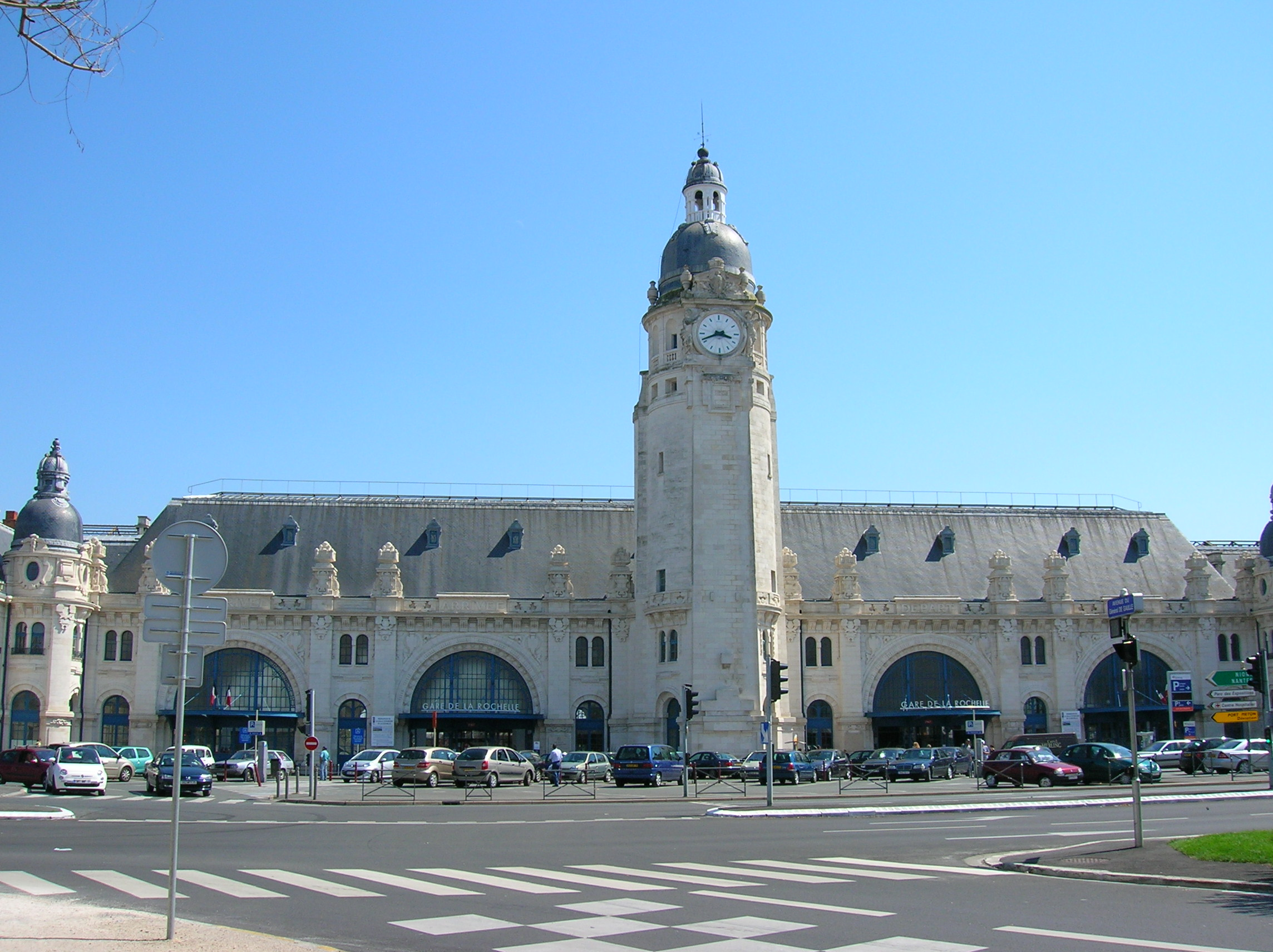 Gare de la Rochelle, France